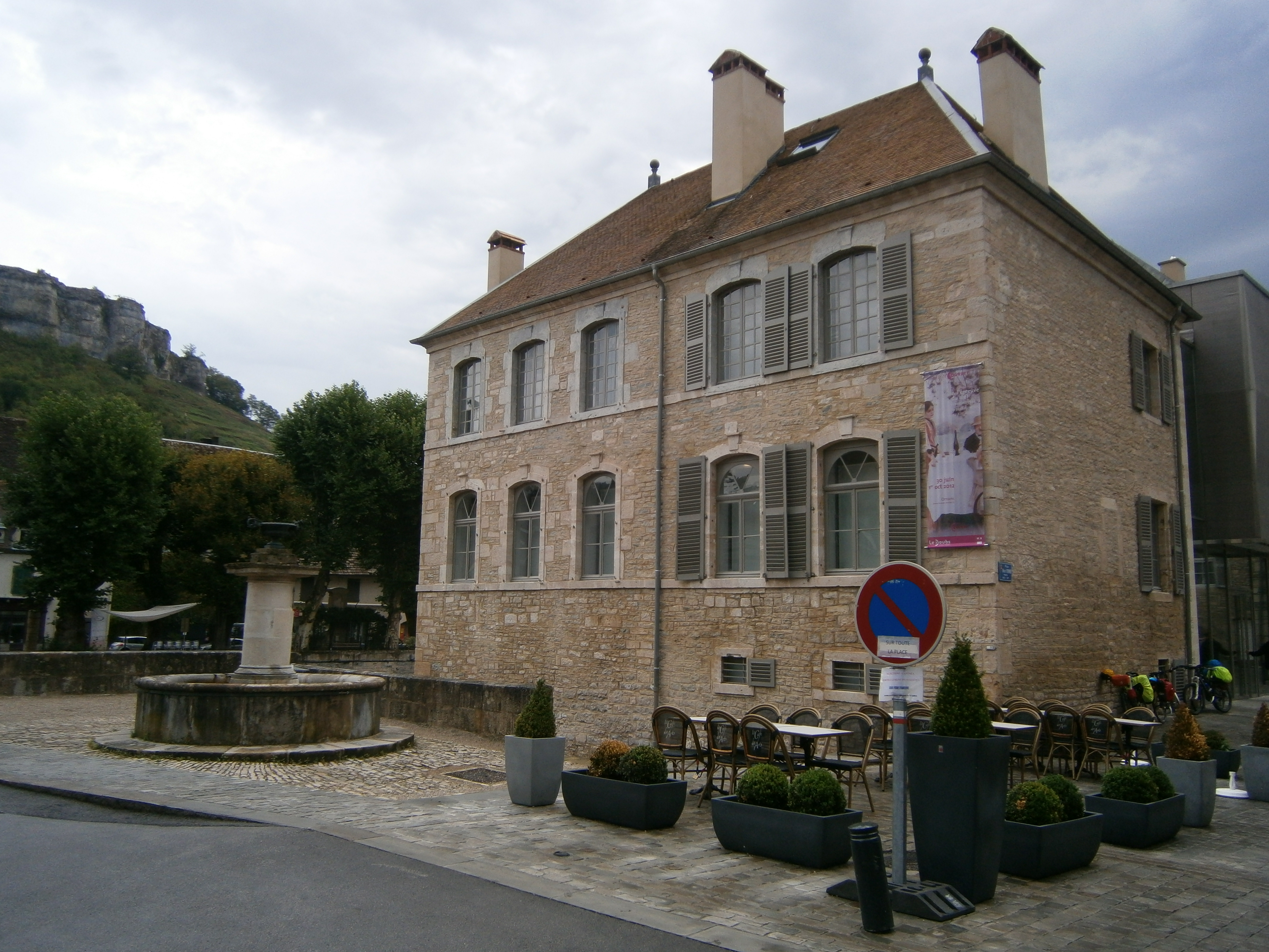 Hôtel de Champerreux (actuel musée Courbet), à l'angle des rues Saint-Laurent et de la Froidière, Ornans.